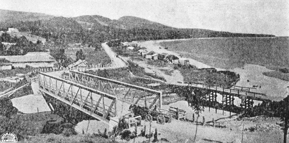 View of Gudauta, Abkhazia